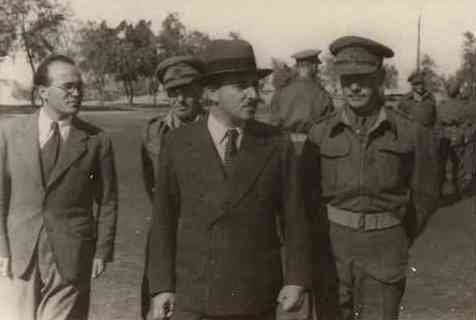 ביקור ביחידת תותחנים Visit to artillery unit, Bourg el Arab, Egypt: Reuven Shiloach, Moshe Sharett קצין בריטי/ משה שרת/ ראובן שילוח בורג' אל ערב, מצרים 10